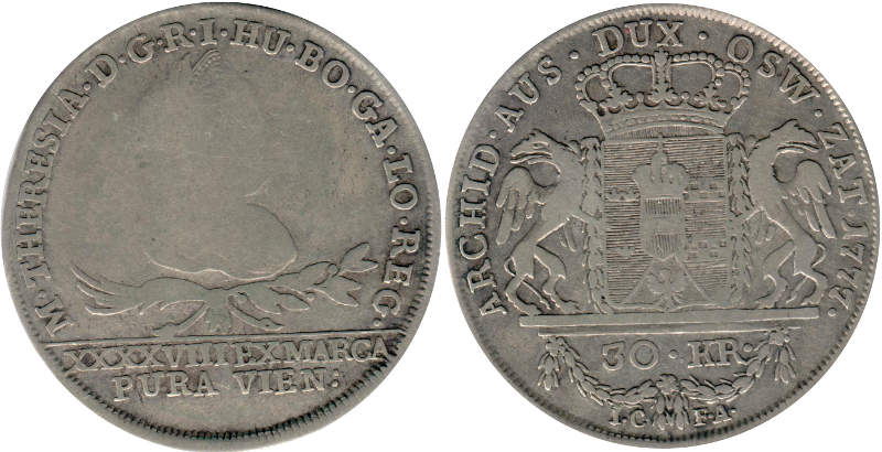 30 krajcarow 1777 KOZ